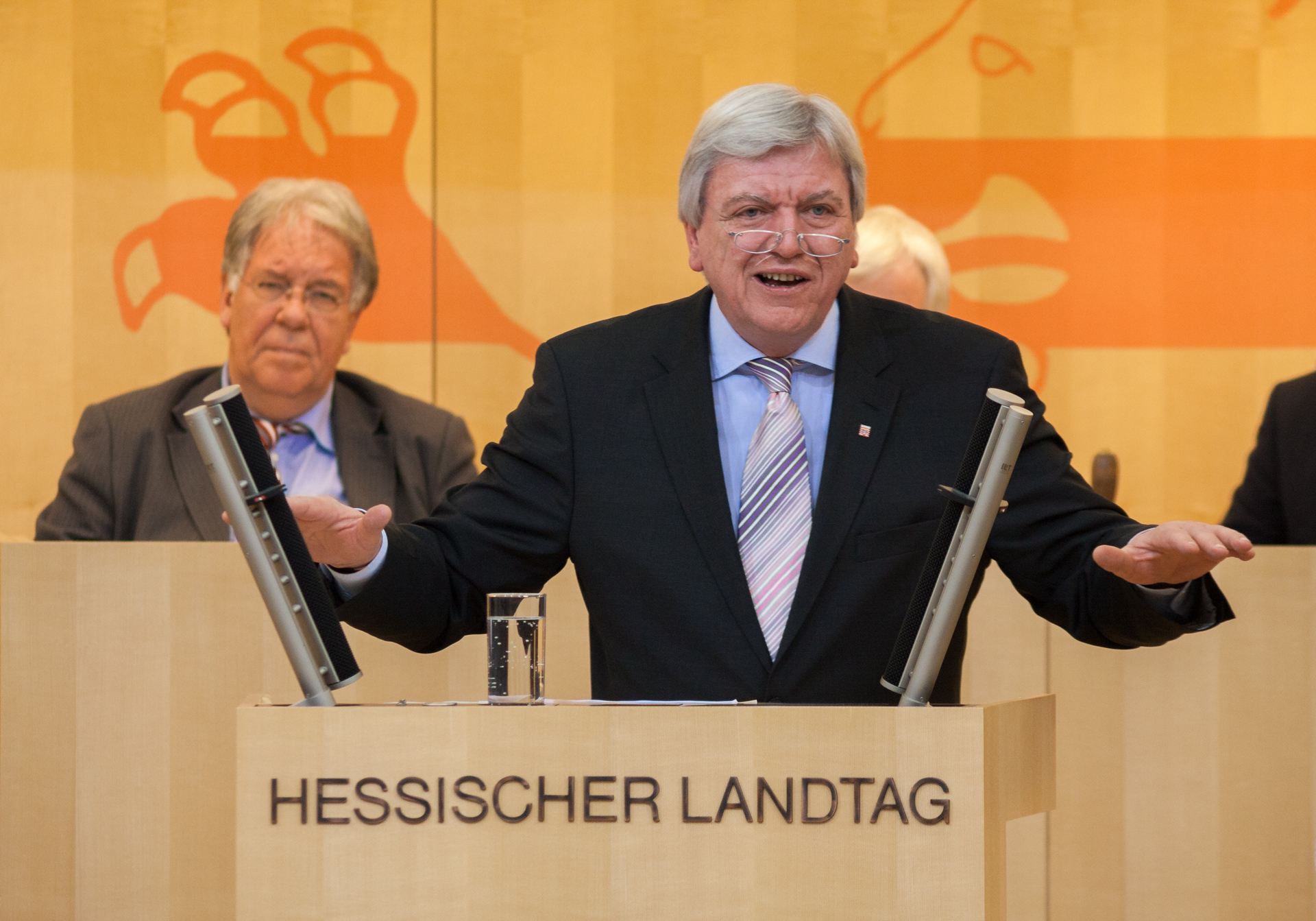 Ministerpräsident Volker Bouffier im Hessischen Landtag während einer Debatte zur Klage gegen den Länderfinanzausgleich